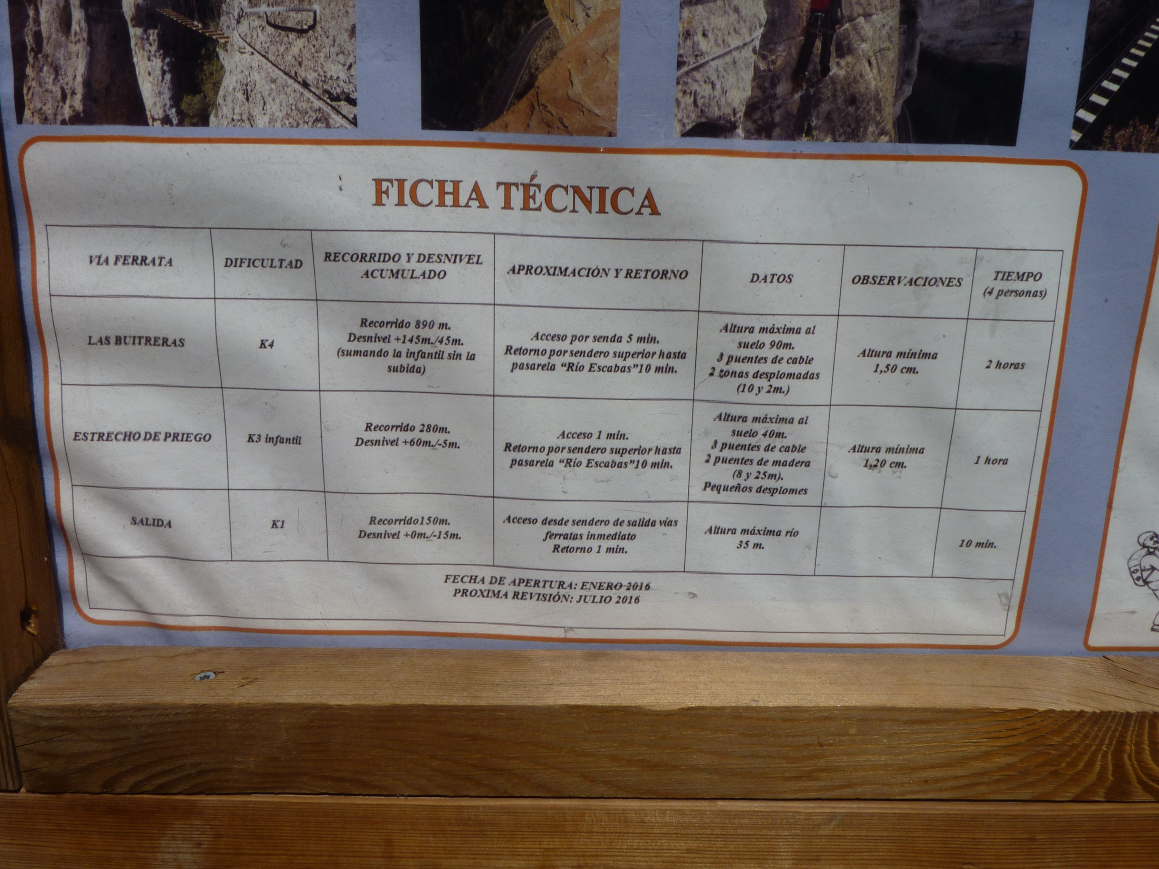 Las tres vías ferratas de que consta la pared del río Escabas